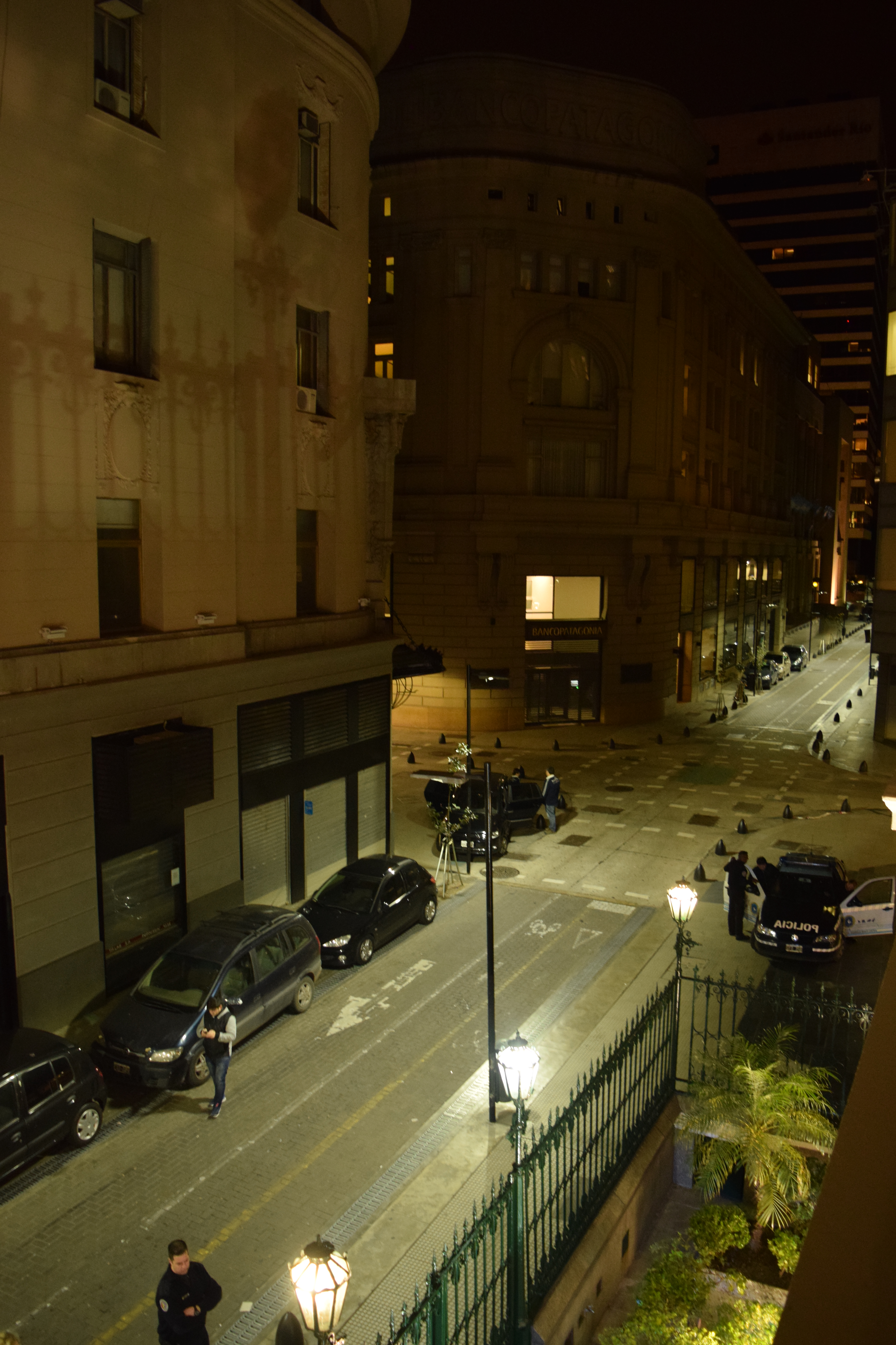 Calle San Martín de la ciudad de Buenos Aires tomada desde el Museo Numismático Dr. José Evaristo Uriburu perteneciente al Banco Central de la República Argentina en la Noche de los Museos 2015.